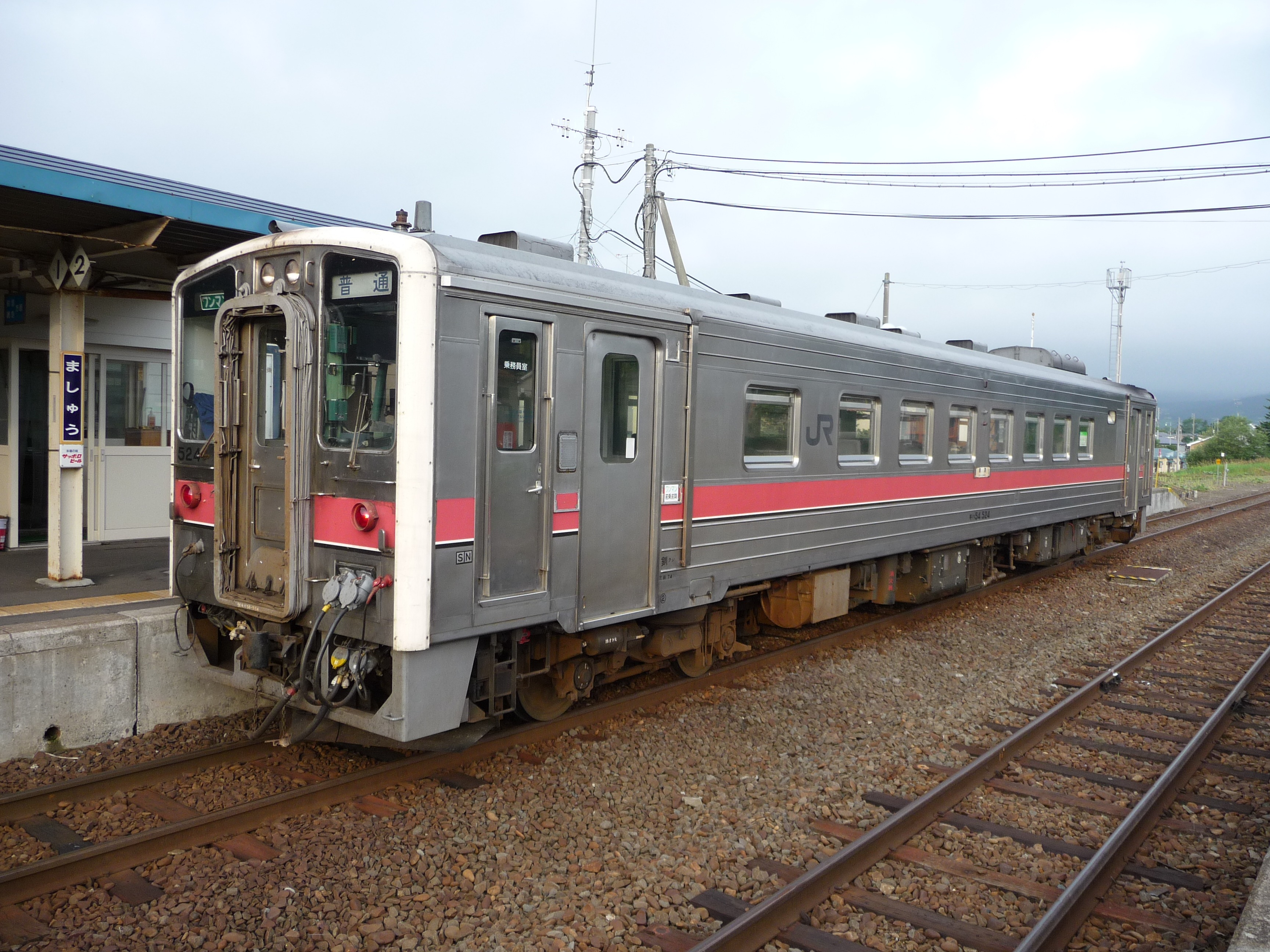 JR北海道キハ54形気動車（キハ54 524）JR北海道釧網本線、摩周駅で撮影